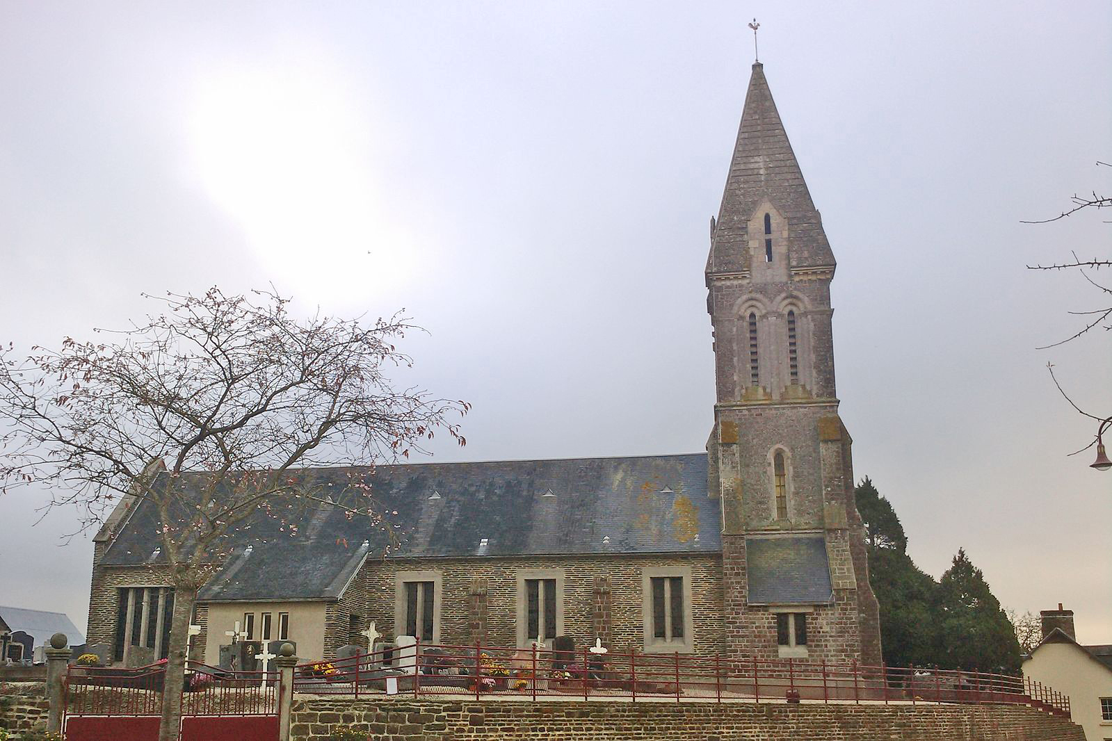 Église Notre-Dame du Mesnil-Raoult